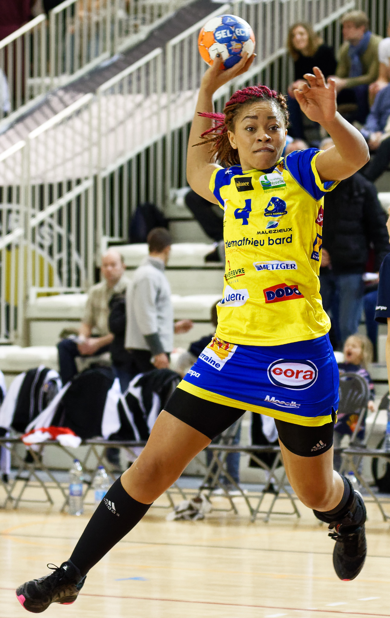 Nina Kanto , le 31 janvier 2016 lors du match Issy Paris Hand / Metz Handball pour le compte de la 14e journée. Au stade Robert Carpentier à Issy-les-moulineaux.